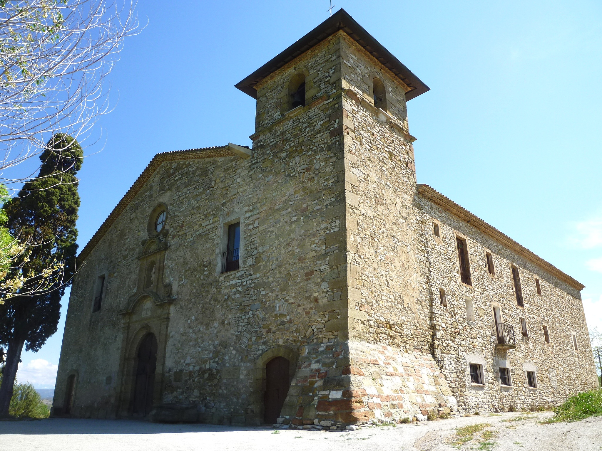 Santuari de Santa Maria d'Ivorra, dita del Sant Dubte, a les afores de la població.